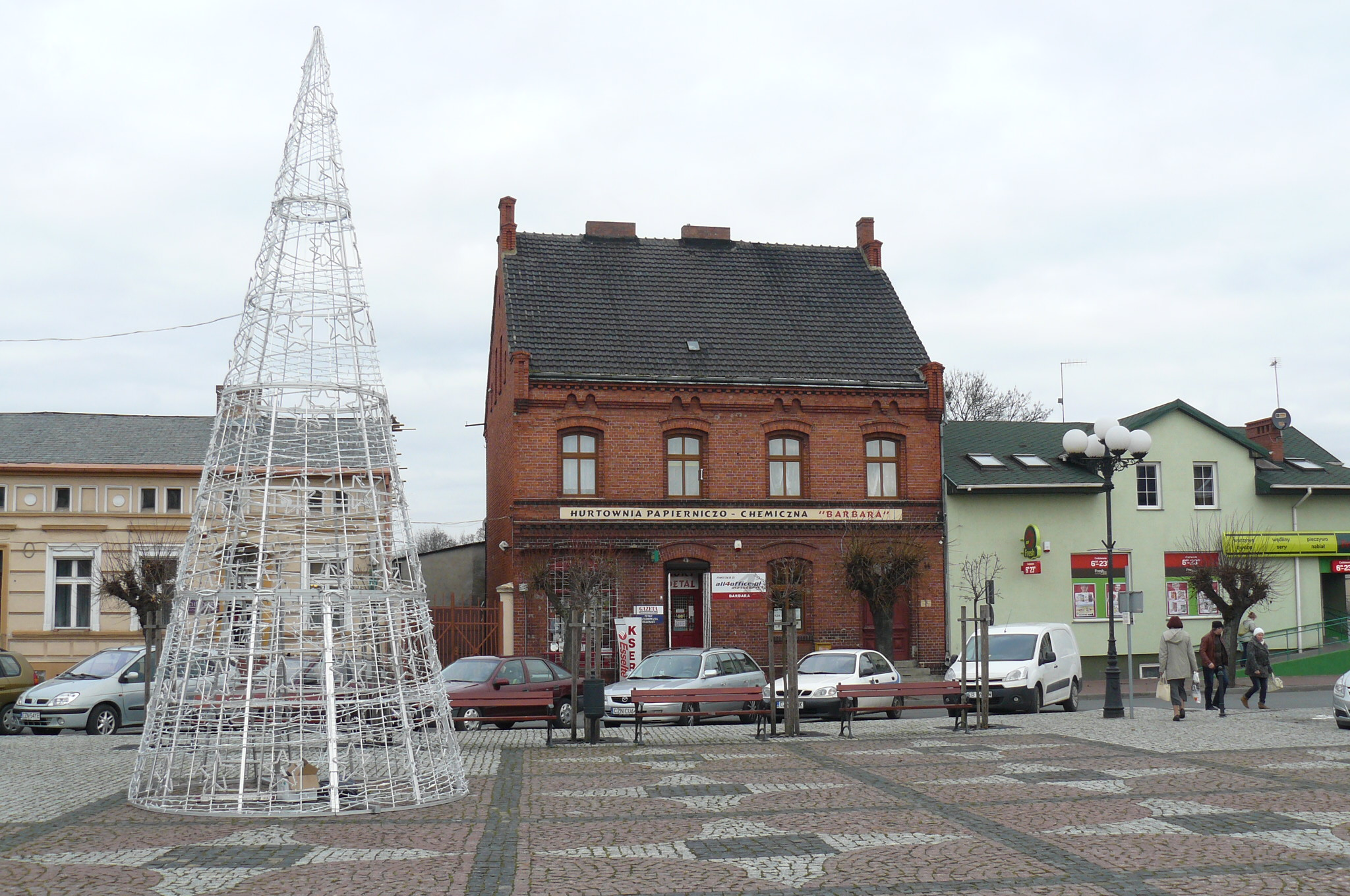 Barcin, rynek.